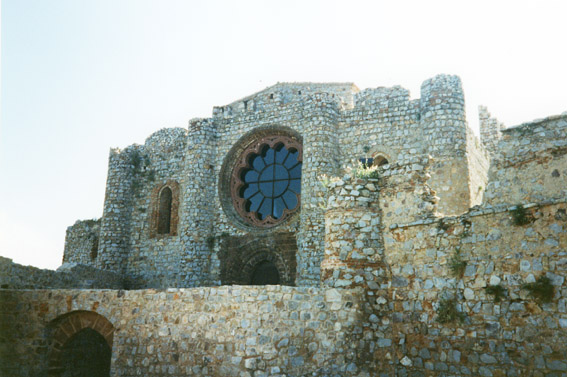 Descripción: Iglesia del castillo de Calatrava la Nueva en Ciudad Real (España). Autor: Fotografía tomada por UsuarioLourdes Cardenal en 1997.